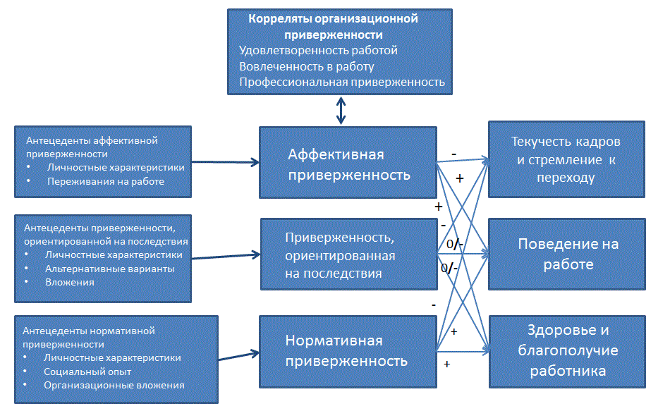 Источник: Meyer, J.P.; Stanley, D.J.; Herscovitch, L.; Topolnytsky, L. (2002). "Affective, Continuance, and Normative Commitment to the Organization: A Meta-analysis of Antecedents, Correlates, and Consequences". Journal of Vocational Behavior 61, 20–52.